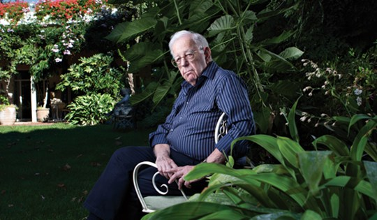 פרופסור שלמה אבינרי אוניברסיטה עברית ירושלים